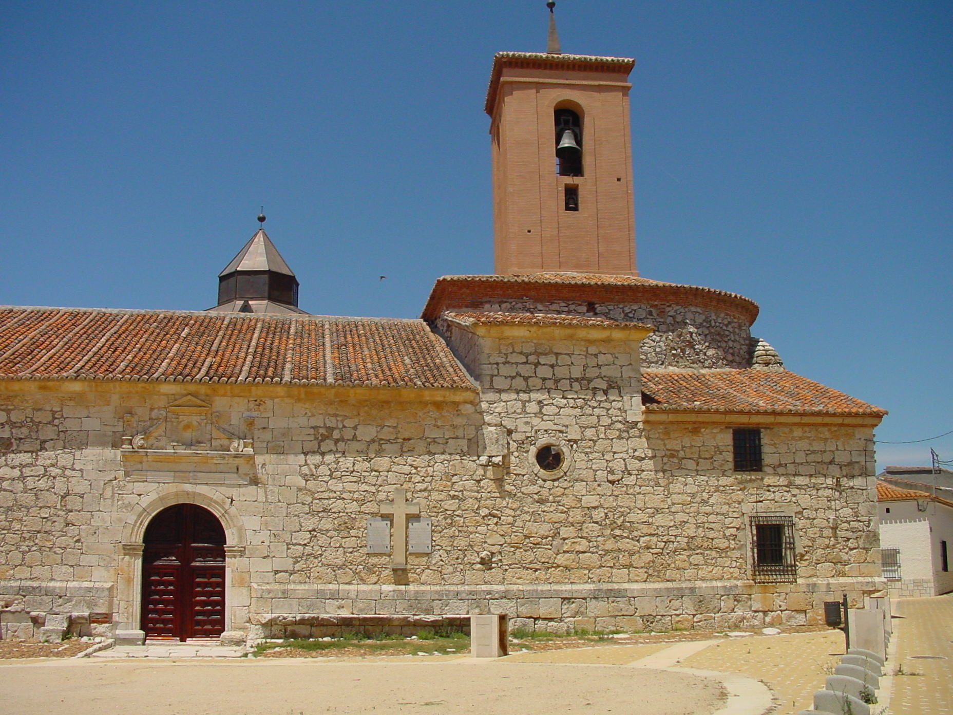 Iglesia en Pozuelo del Rey.